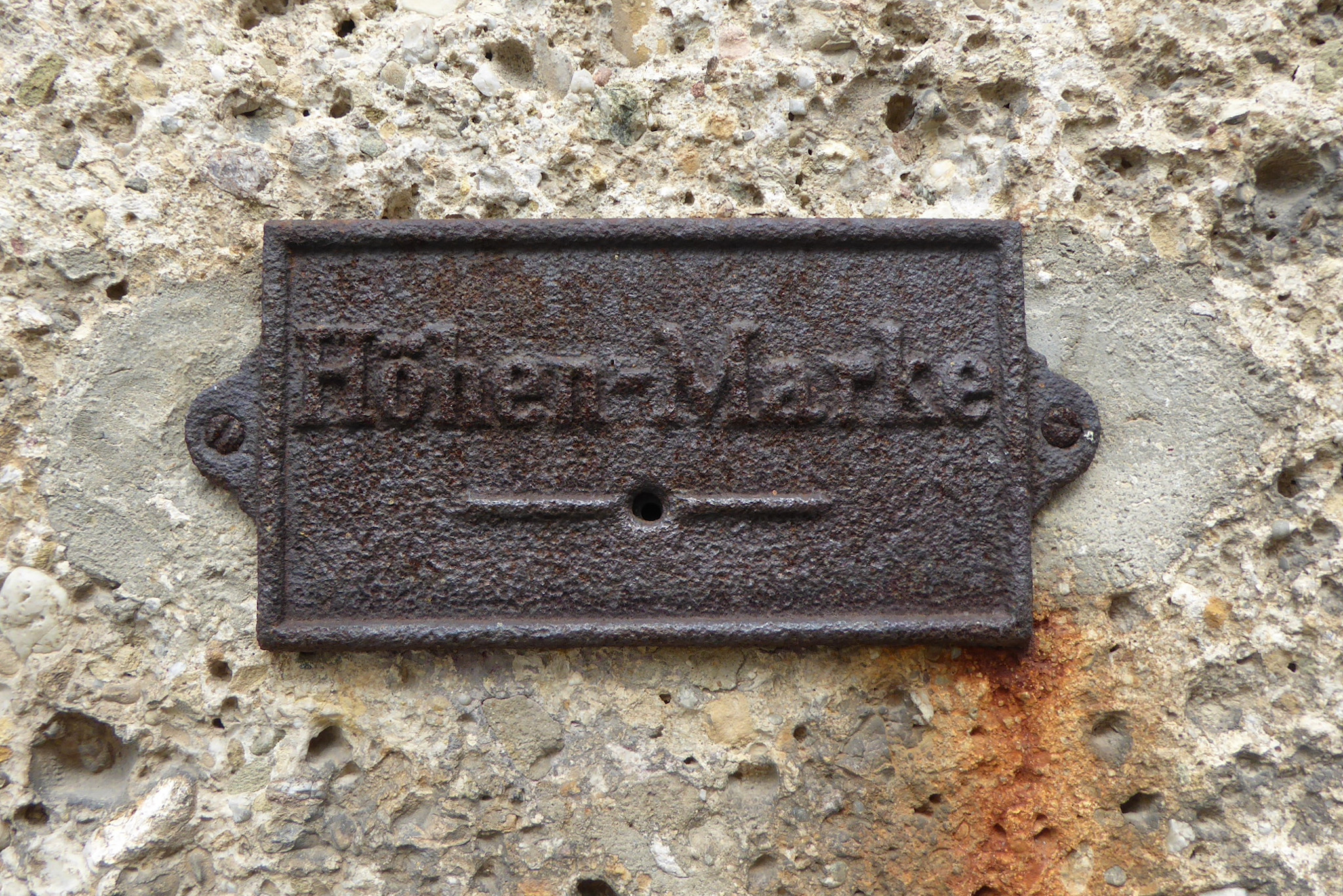 Historische Lochmarke zur Angabe der Höhe über dem Meeresspiegel an der Stiftspfarrkirche in Altötting.